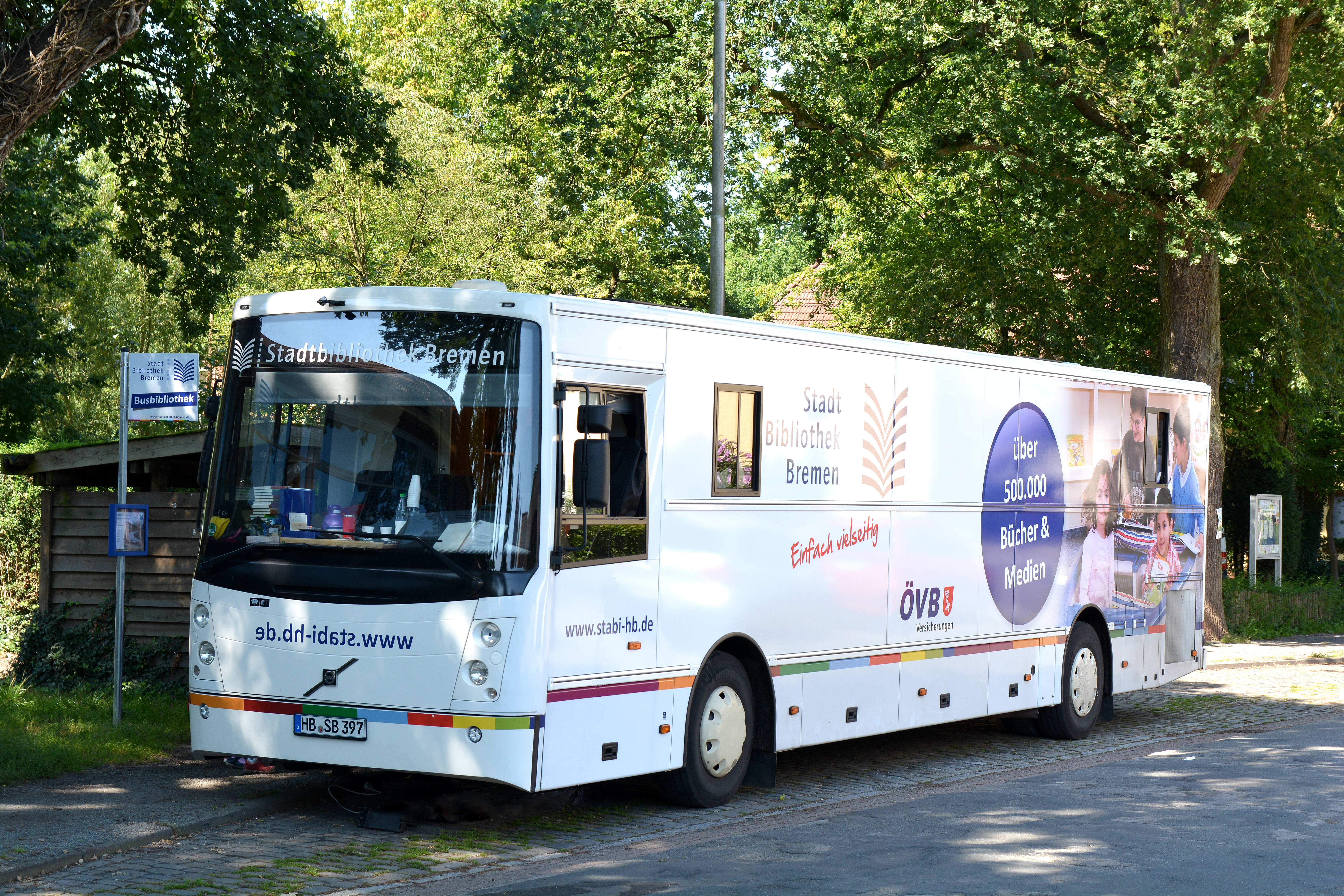 Bibliotheksbus draußen